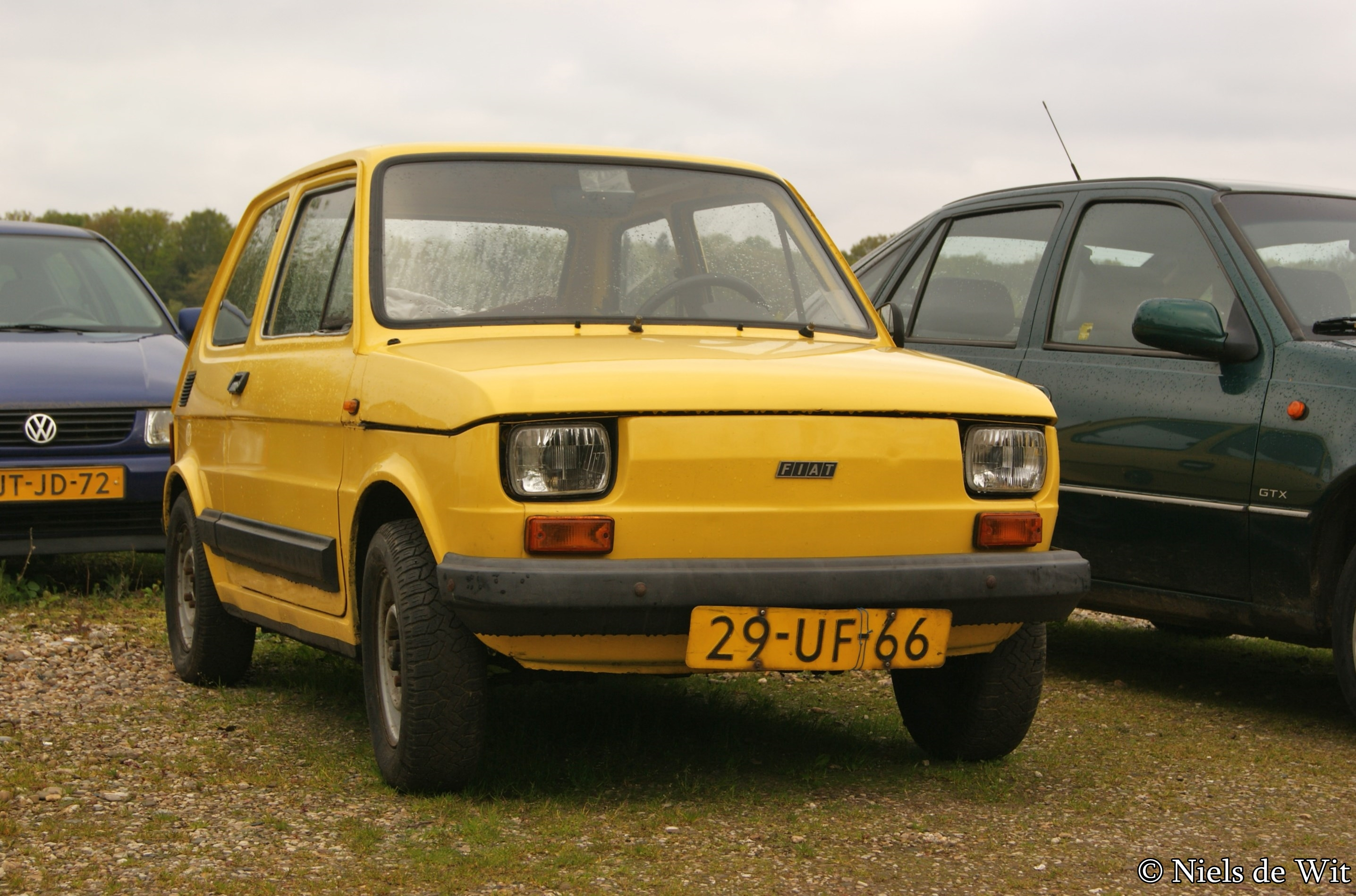 29-UF-66 Autobedrijf Imminkhuizen